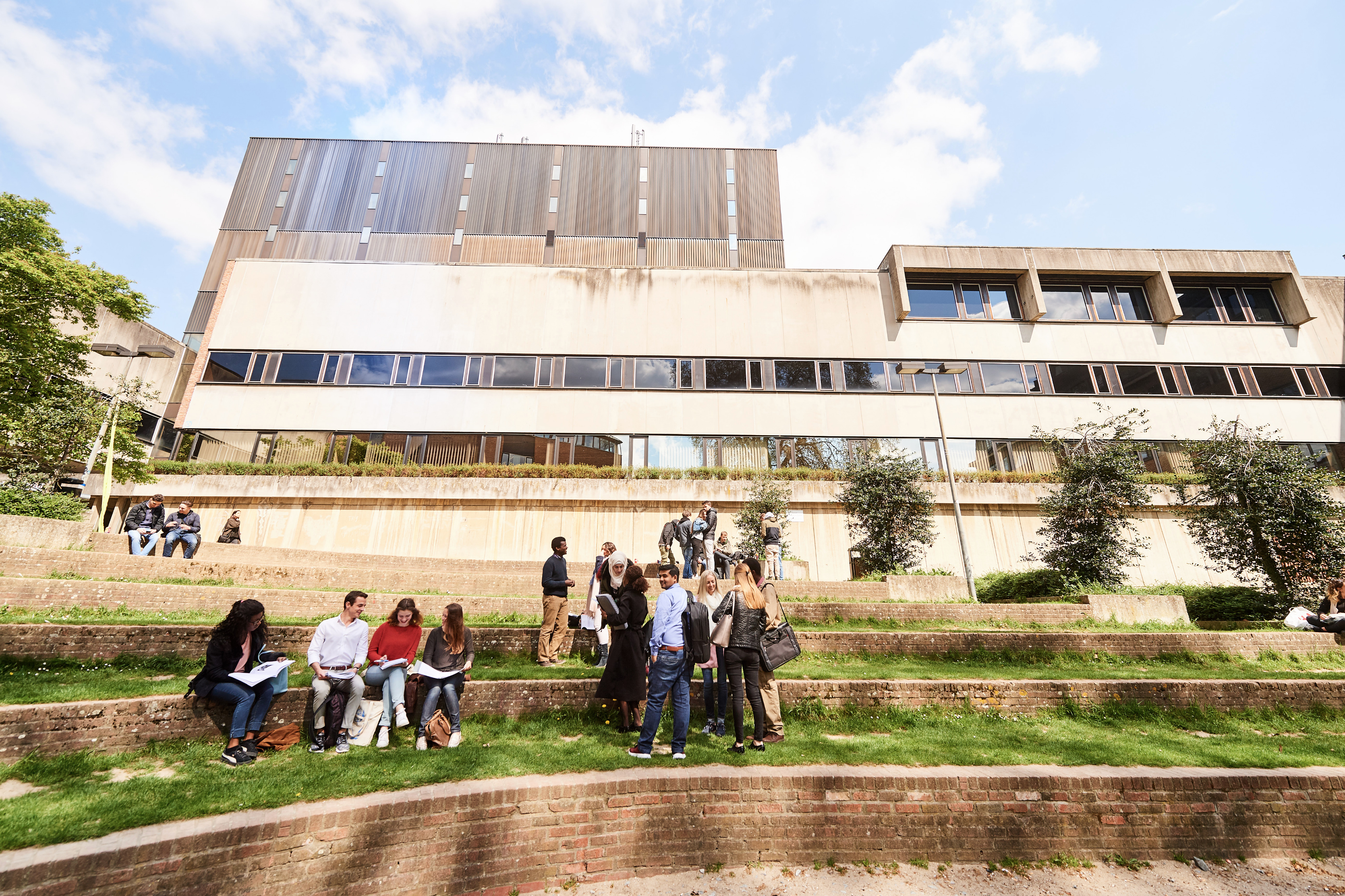 © UNamur - Benjamin Brolet